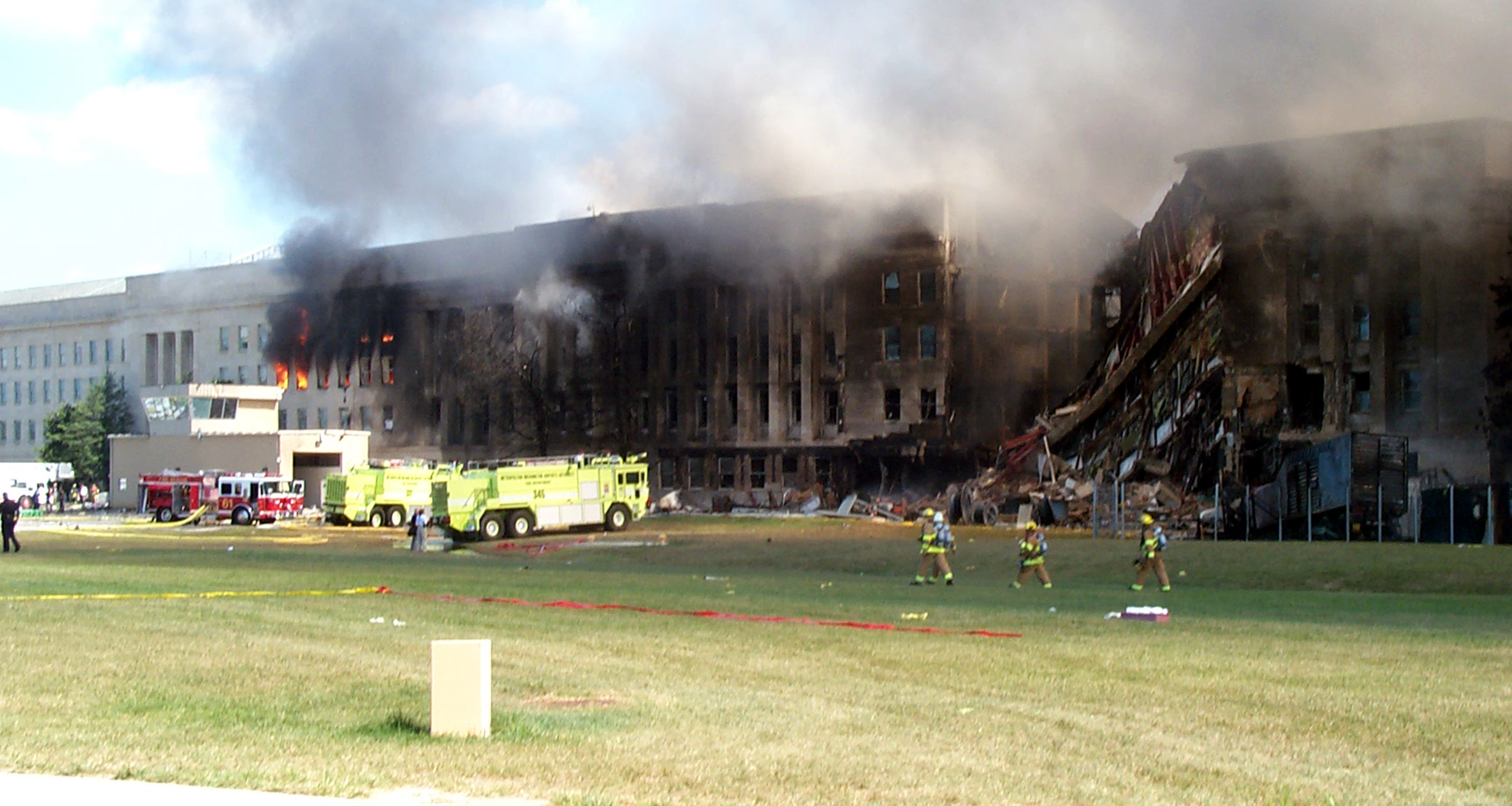 Pentagon nach Einsturz